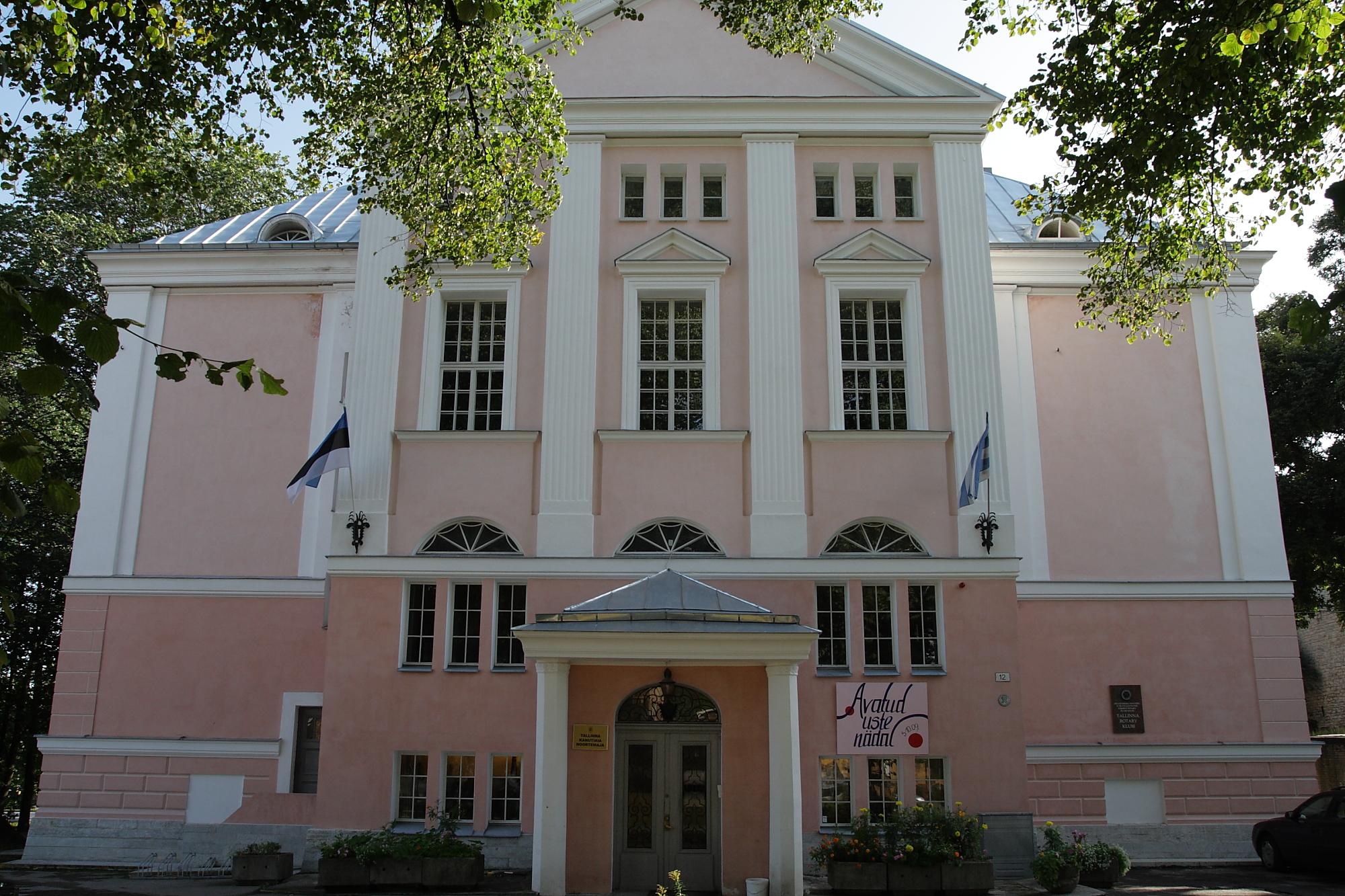 Tallinn, klubihoone (peahoone ja tiibhoone) Aia tn 12, 1870